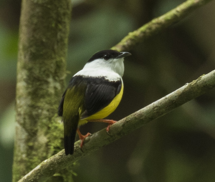 White-collared Manakin - Sarapiqui - Costa Rica_MG_0596